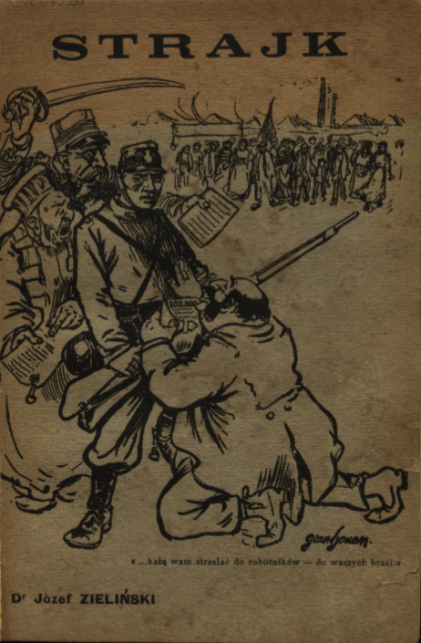 Okładka broszury Józefa Zielińskiego "Strajk" (wyd. Paryż 1909)